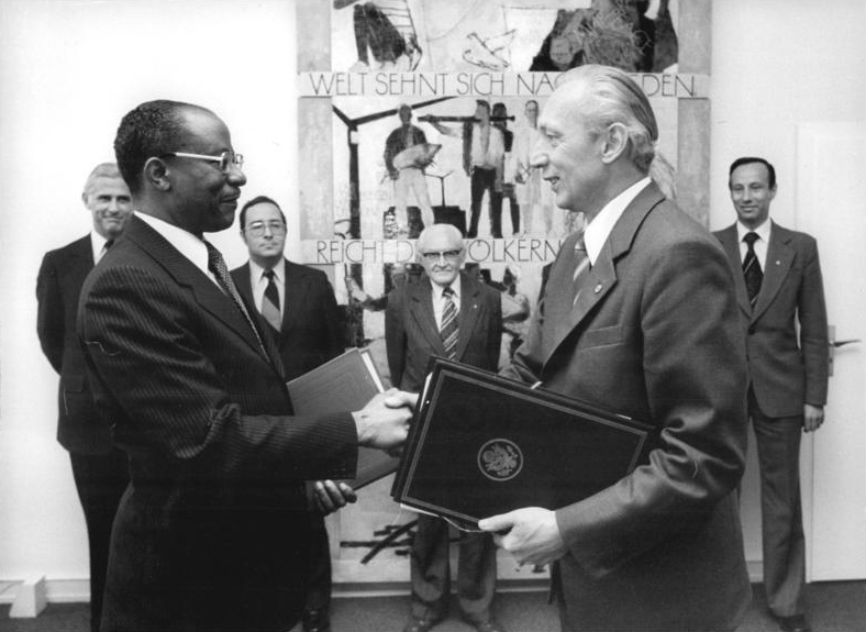 ADN-ZB Franke-4.9.79-eng-Berlin: Ein Konsularvertrag zwischen der DDR und den USA wurde am 4.9. in Berlin durch den Stellvertreter des Ministers für Auswärtige Angelegenheiten der DDR Kurt Nier (r) und den Botschafter der USA, David B. Bolen unterzeichnet. Der Vertrag - hier die Unterzeichner beider Staaten beim Austausch der Dokumente - regelt die konsularischen Beziehungen zwischen der DDR und den USA.